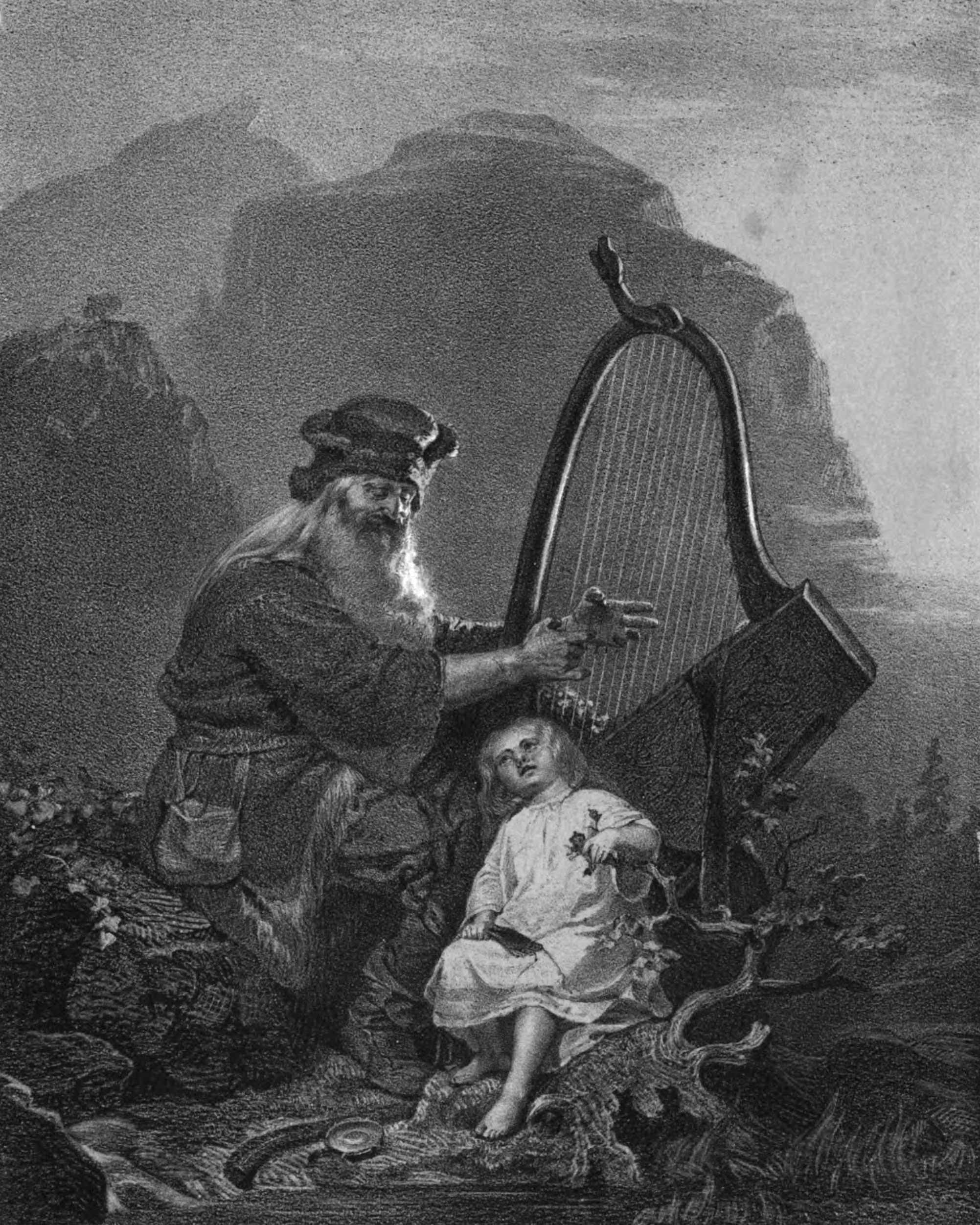 King Hejmer and Aslaug